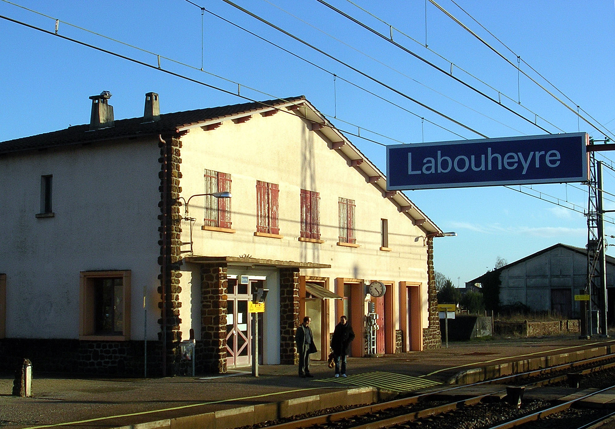 Labouheyre (Landes, Aquitaine, France) - Gare de Labouheyre.